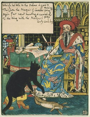 Гравюры по рисункам Крейна к сказке "Кот в Сапогах"